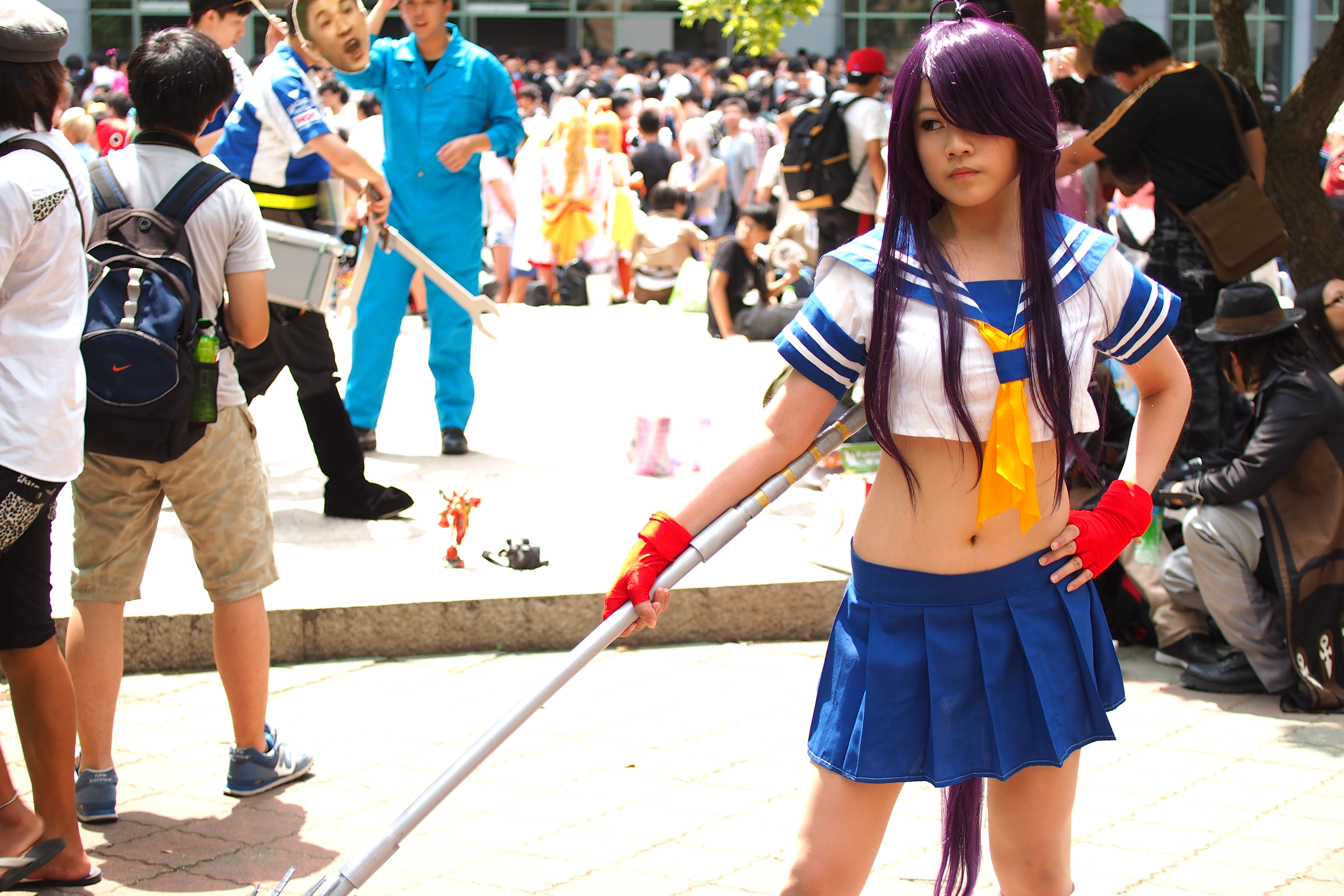 第22屆開拓動漫祭，《一騎當千》關羽雲長cosplayer。